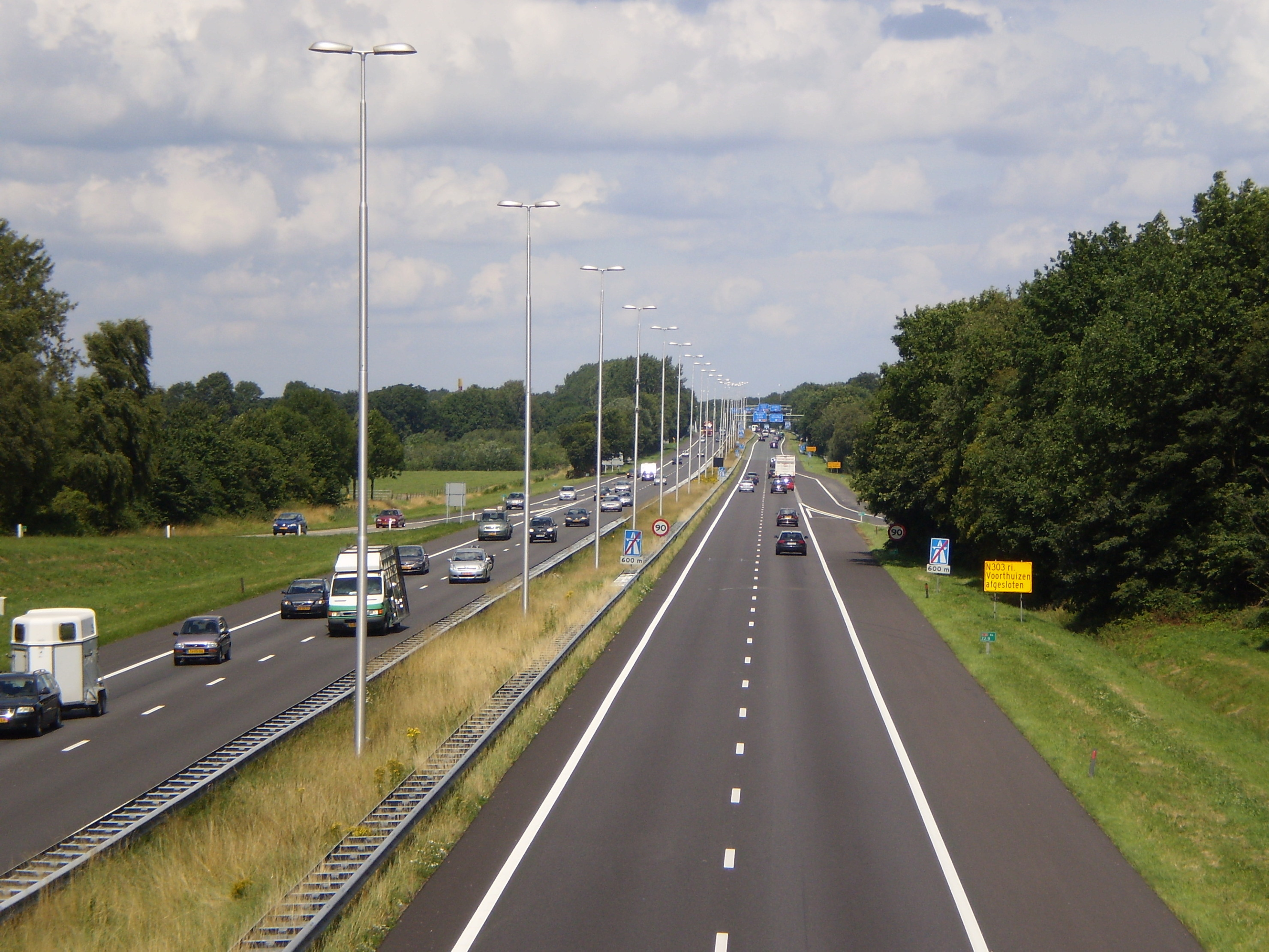 A30 afslag Thorbeckelaan Barneveld